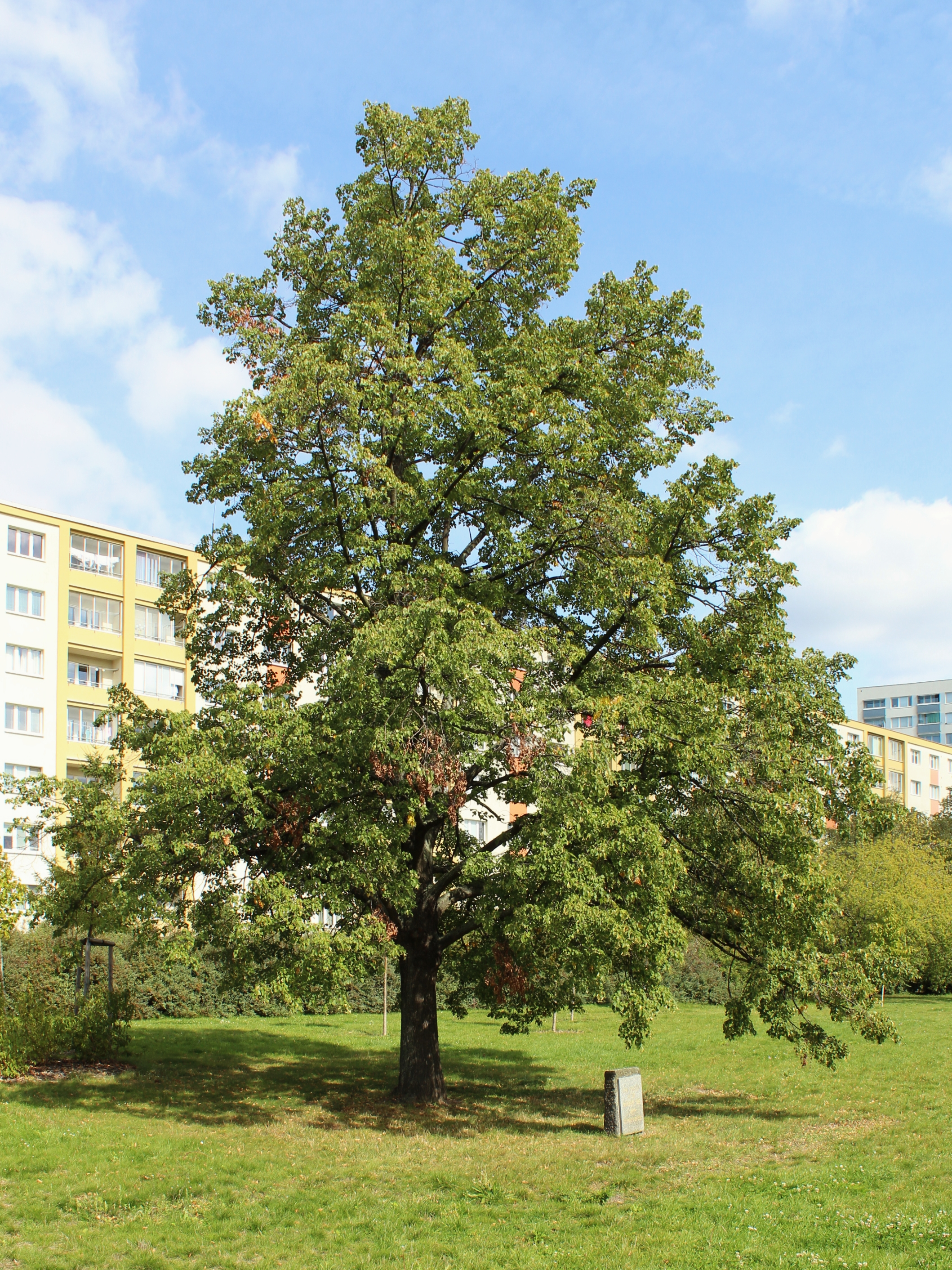 Praha, Vokovice